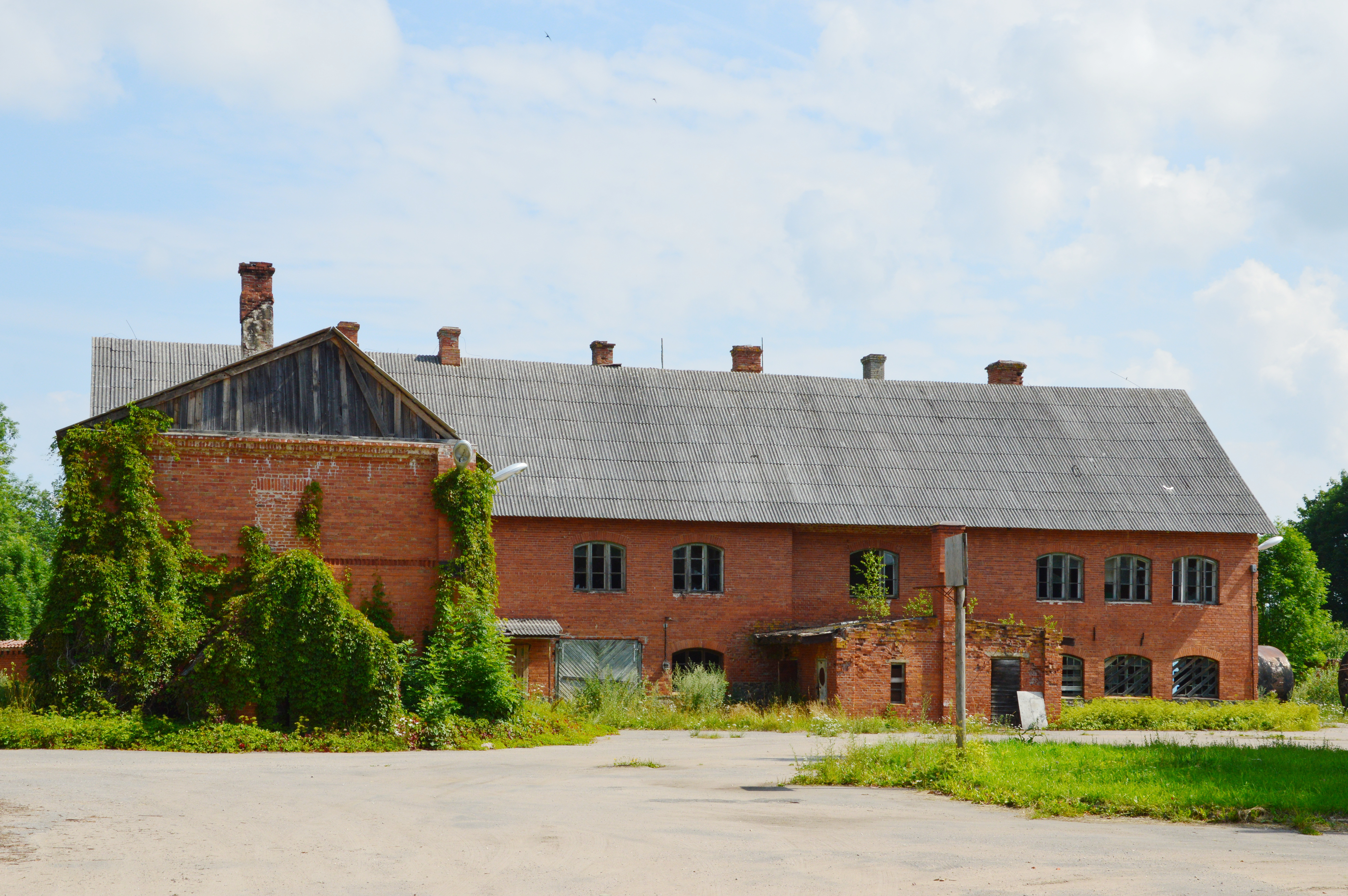 Sangaste mõisa meierei